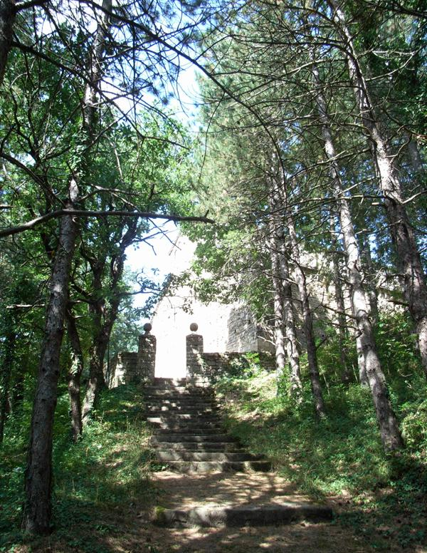 Vista esterna della scalinata di accesso della Pieve di Sasso - Neviano degli Arduini (Parma)